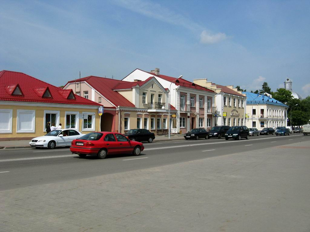 Беларуская (тарашкевіца): Шчучын